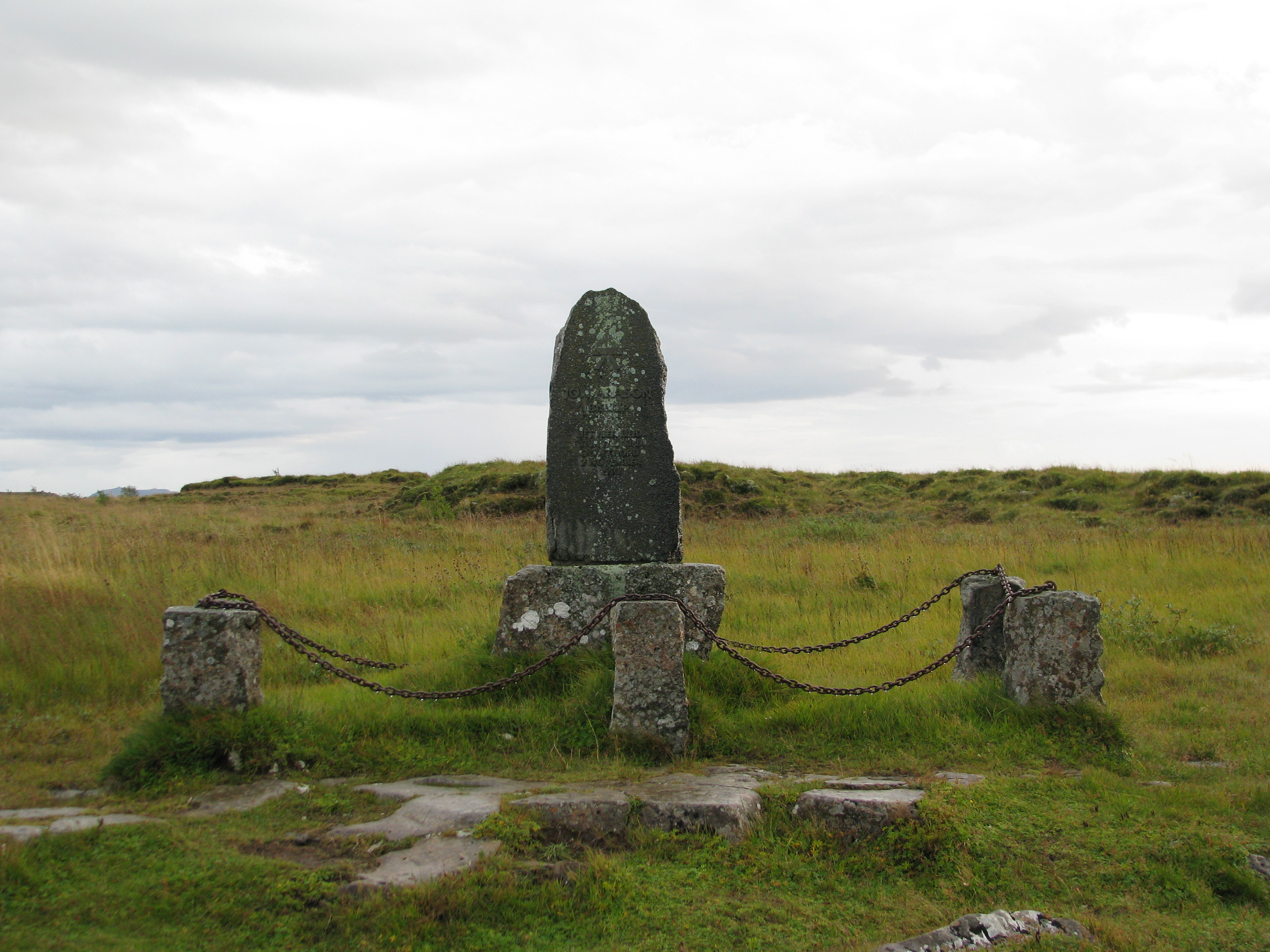 Monument, Jón Arason, Skálholt, Iceland